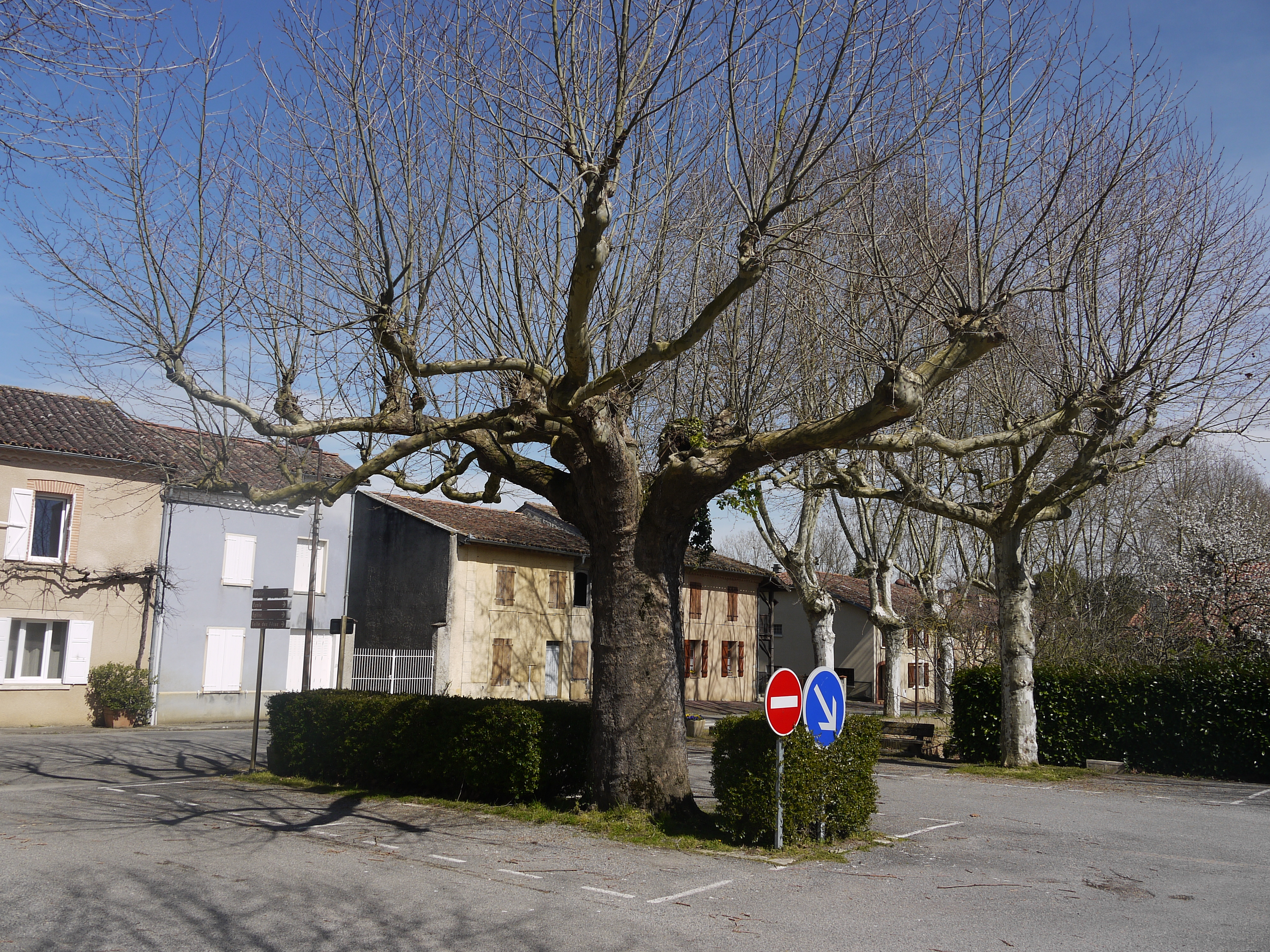 Une rue du village d'Anan.